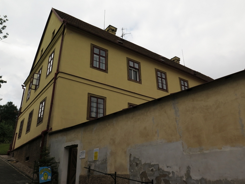 Fara, náměstí 5. května 1, Jablonné nad Orlicí.